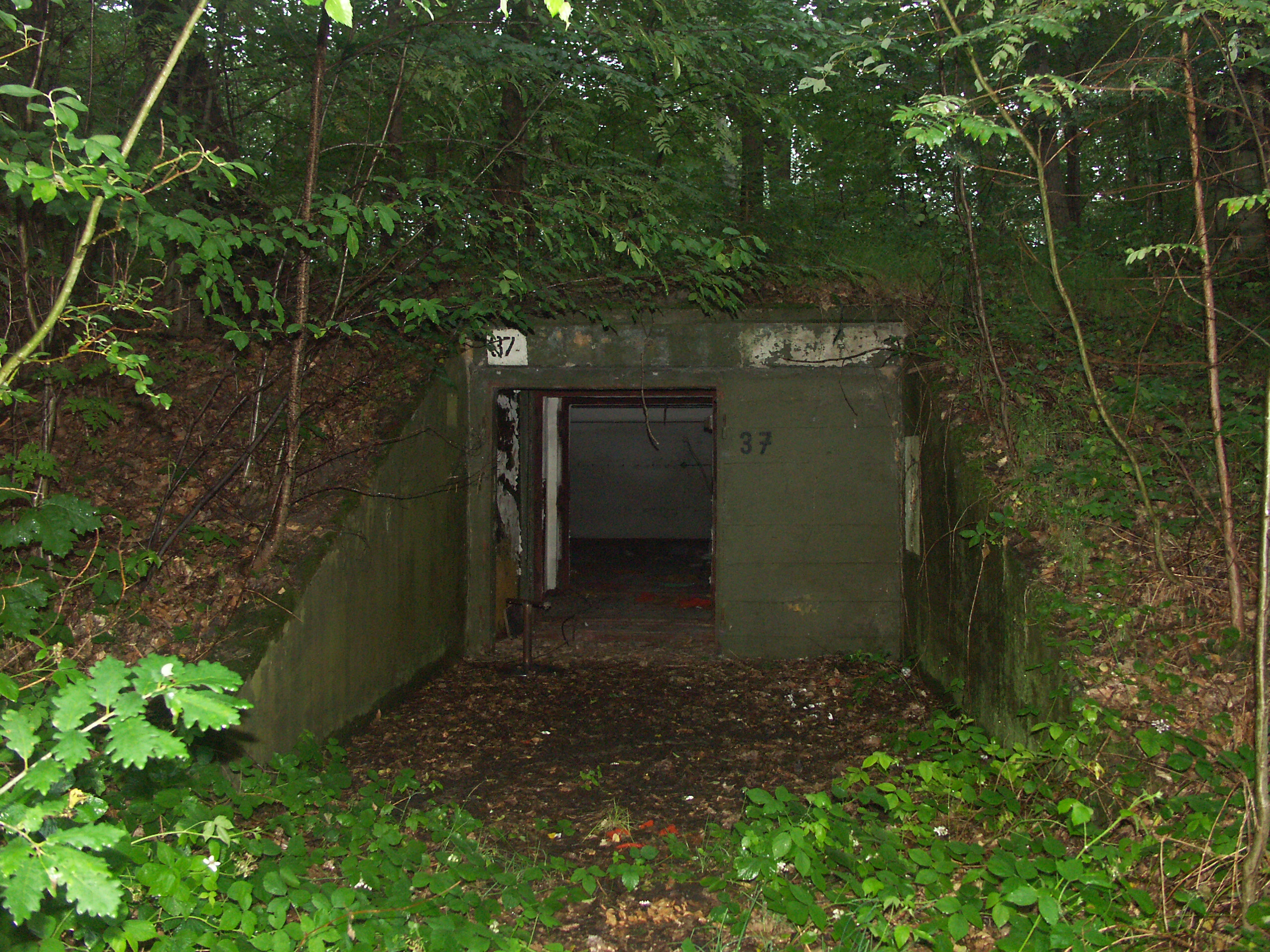 Bunker Nr. 37 auf dem Gelände der ehemaligen Muna Hohenleipisch